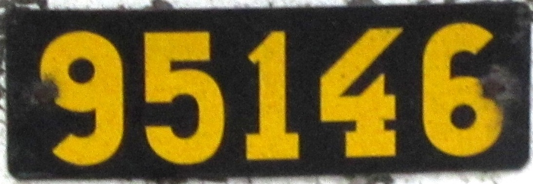 Zweeds leger kenteken